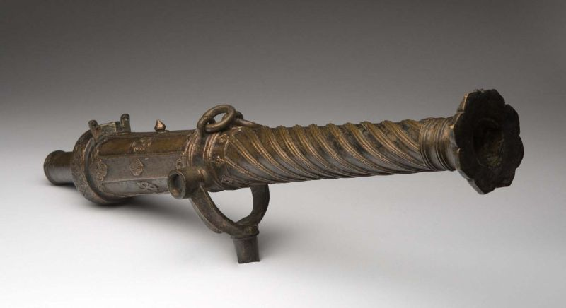 Kanon. Klein bronzen kanon met inscriptie in Arabisch schrift